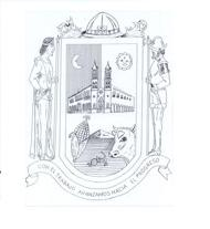 Escudo de armas